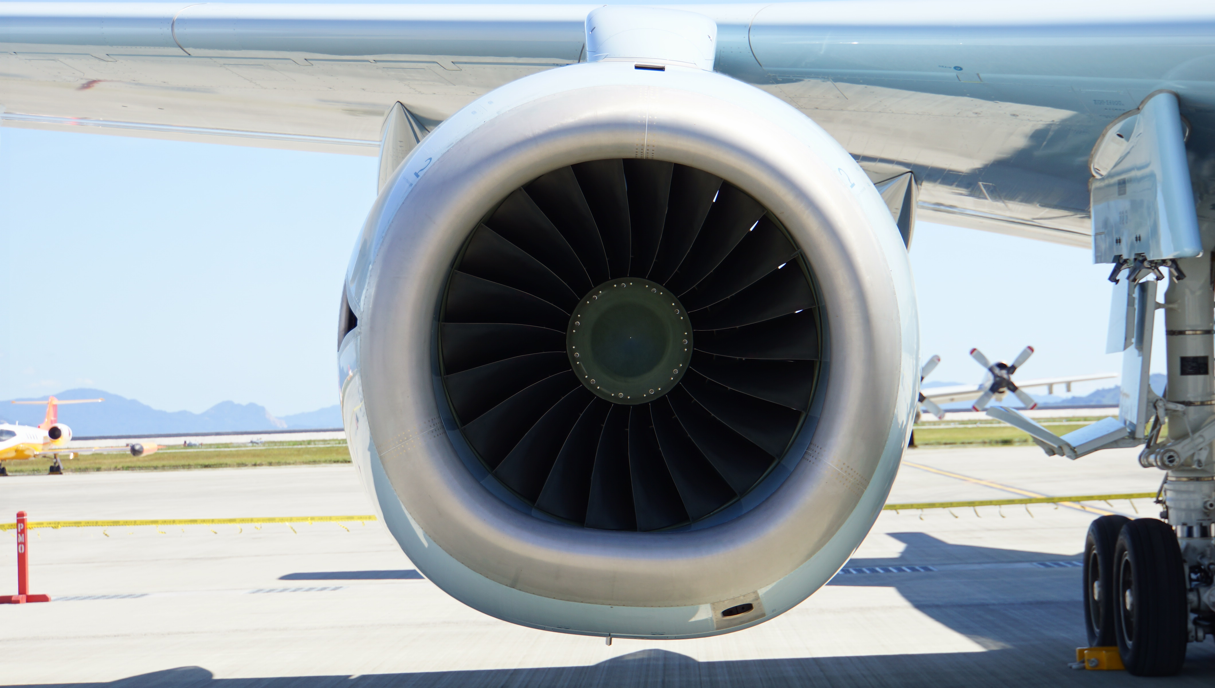 海上自衛隊 P-1哨戒機（5506号機） 右主翼部F7-10ターボファンエンジン 正面より。 14年9月14日 岩国航空基地にて。